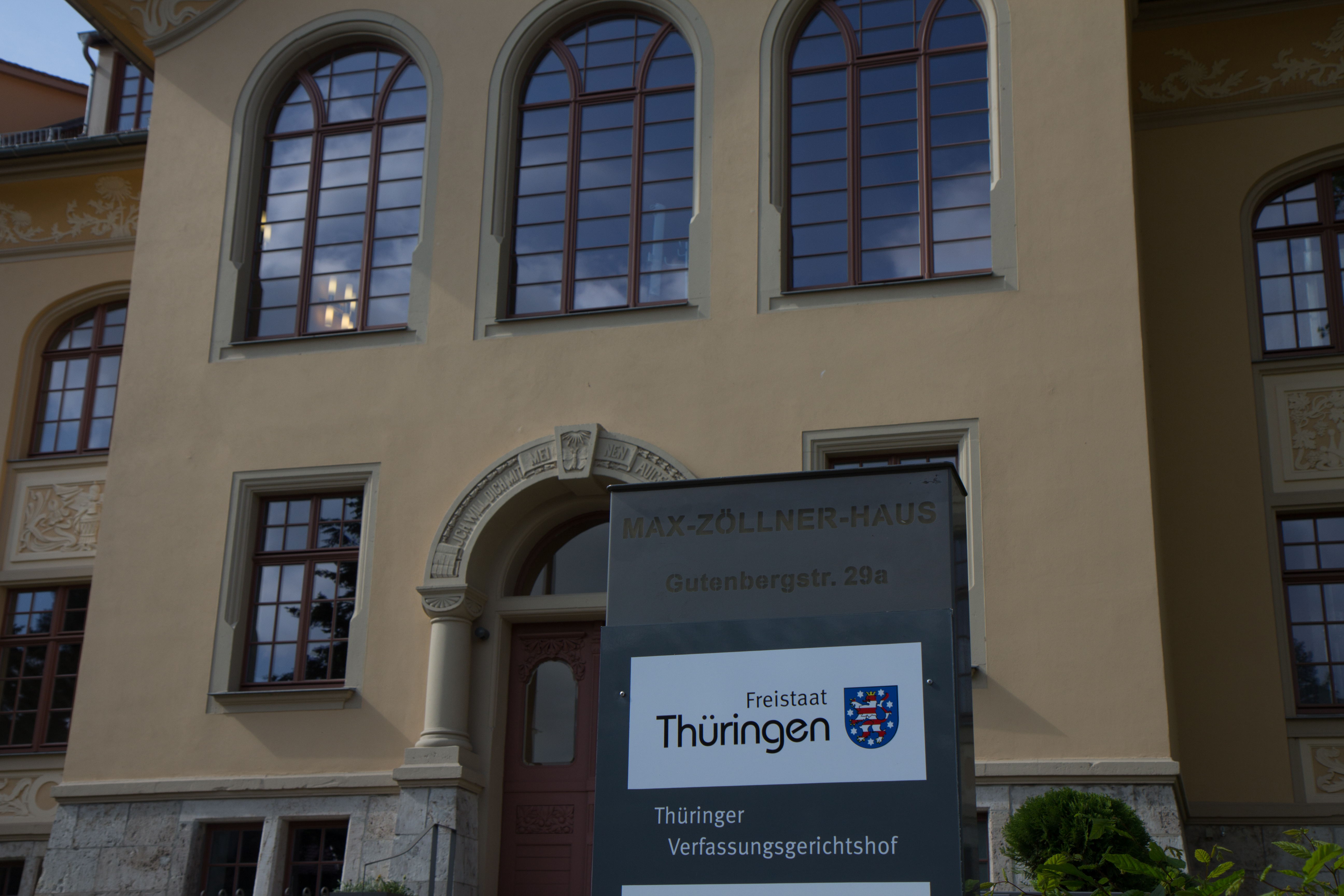 Thüringer Verfassungsgerichtshof. Öffentliche Sitzung am 14. Juni 2017 in Weimar